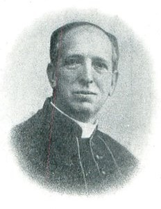 Mons. Guido de Gentili (1870-1935), poslanec Říšské rada a prof. teologie v Trentu